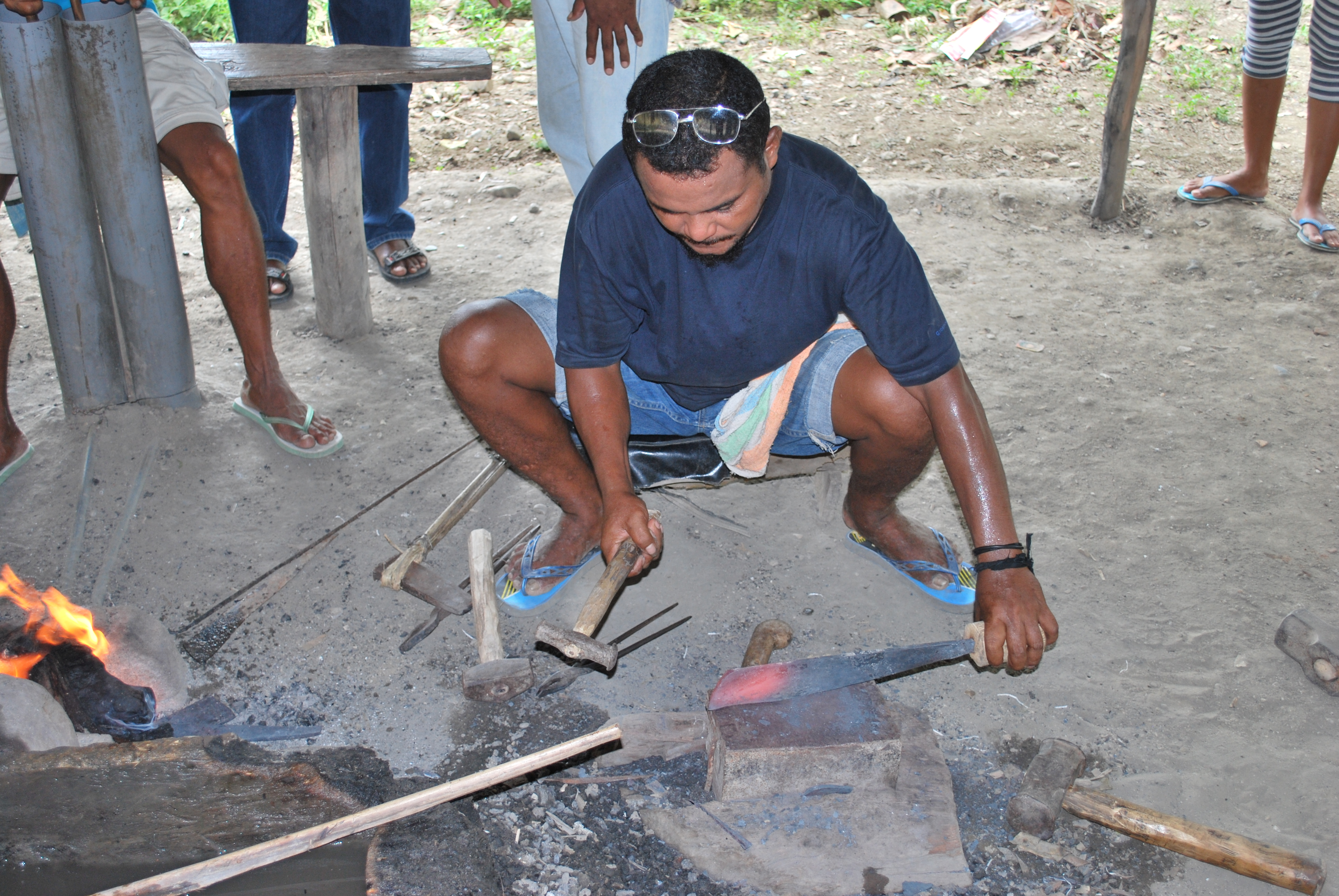 Schmied in Buanurac, Loi-Huno